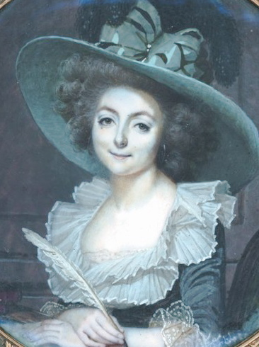 Self-portrait